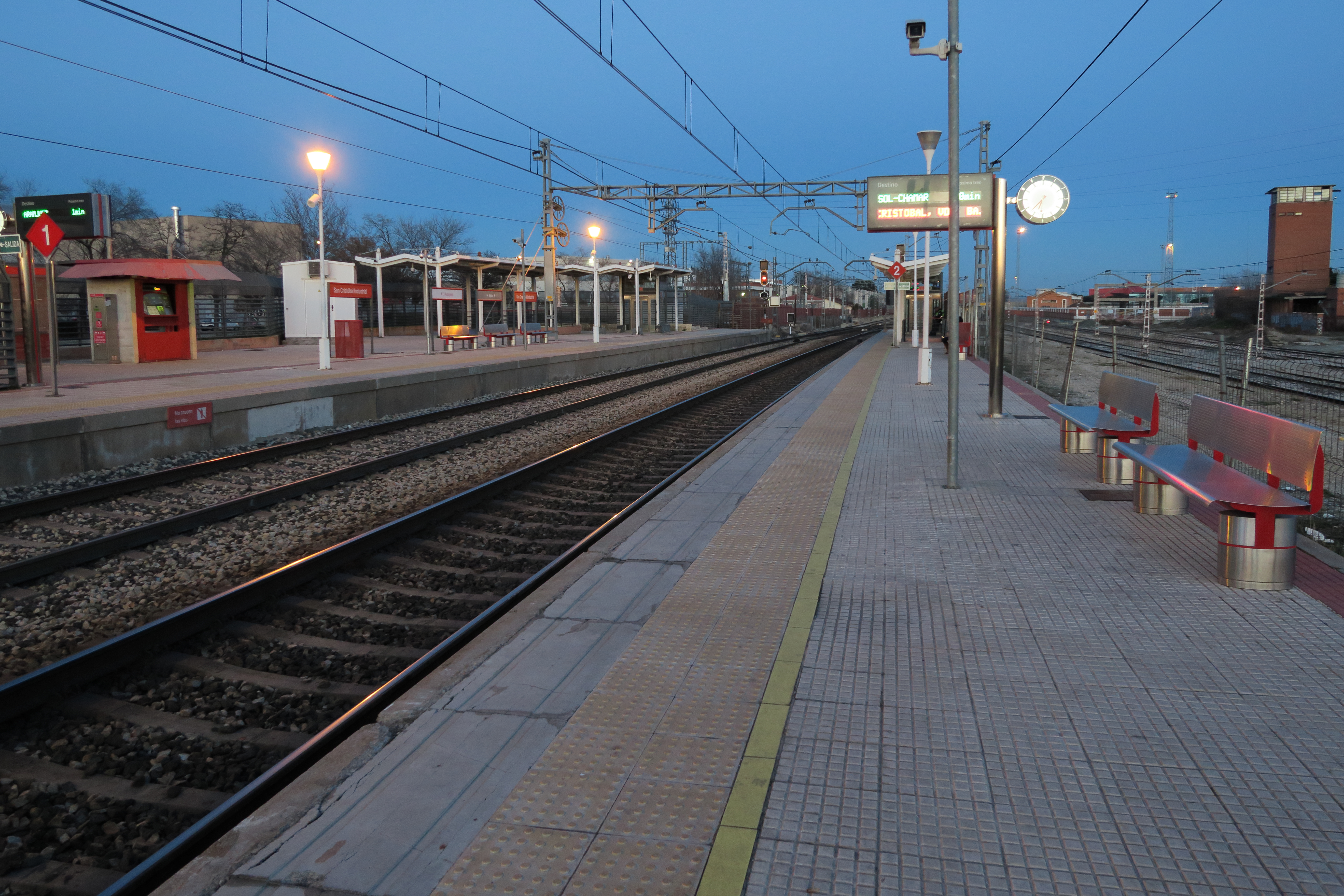 Estación San Cristóbal Industrial, Madrid